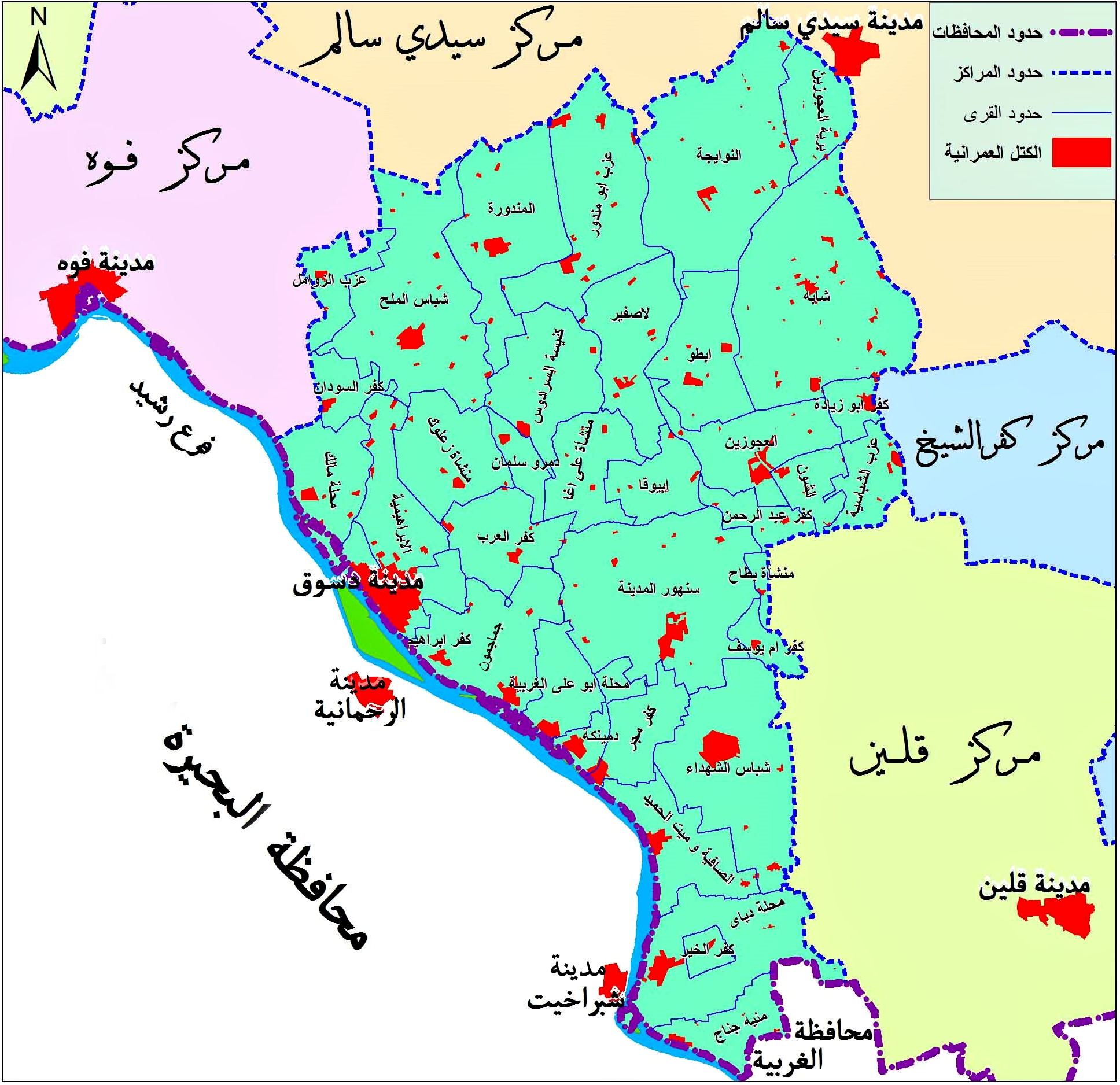 خريطة مركز دسوق، مصر.